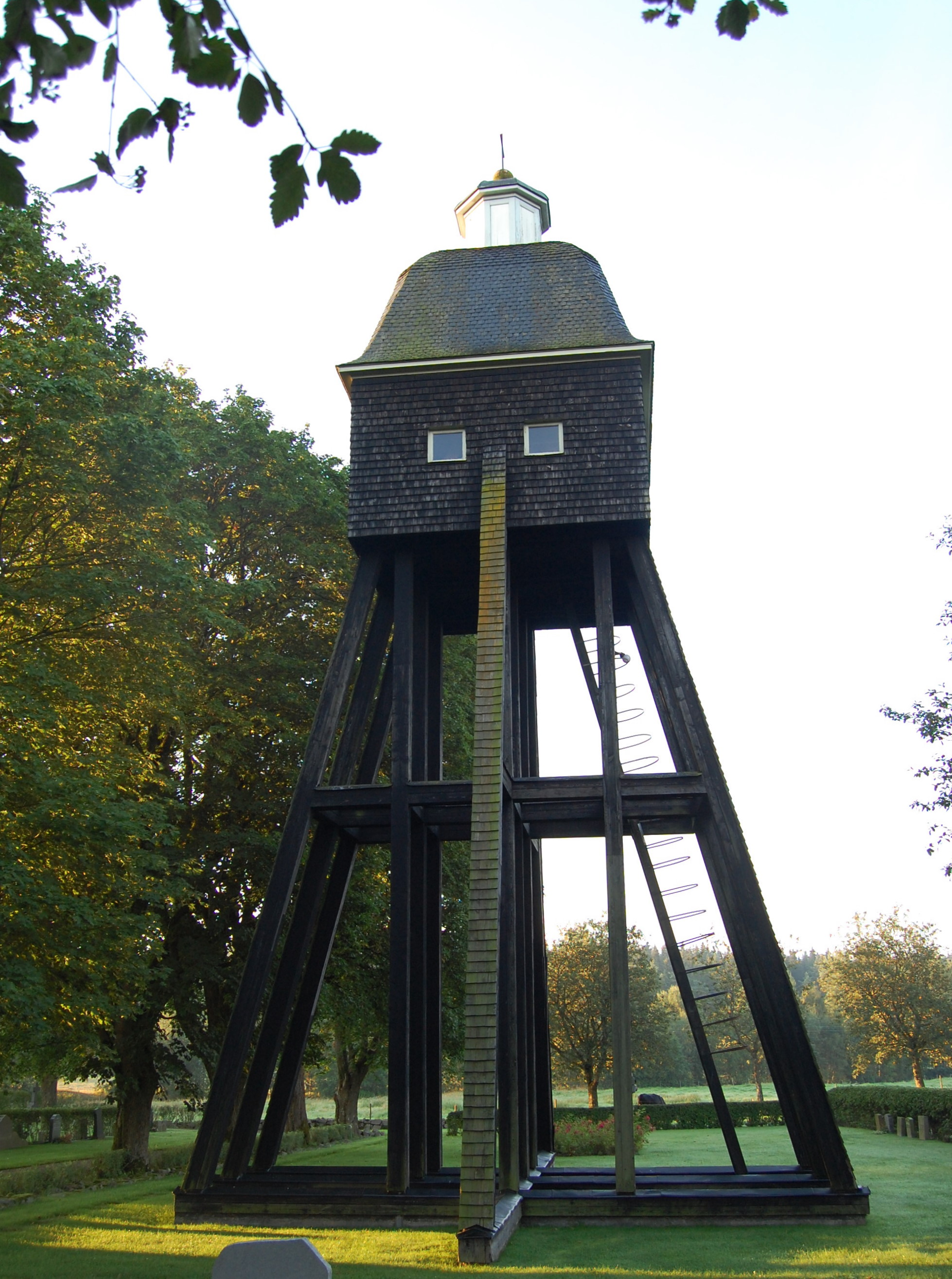 Glockenturm neben der Kirche von Norra Ljunga